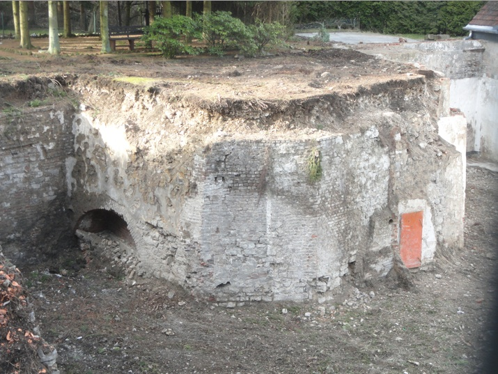 Kalkofen Zillerstal